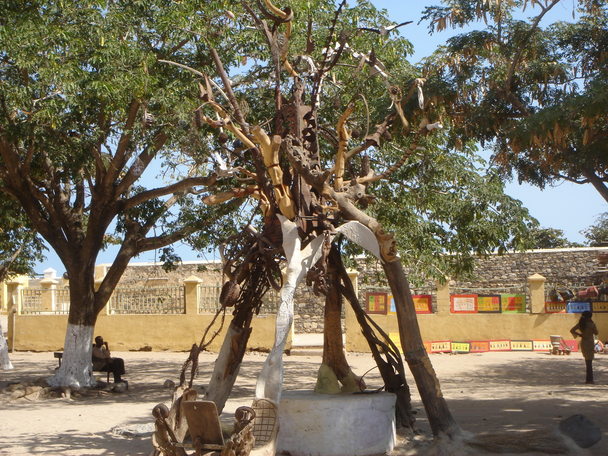 Ile de Gorée (Sénégal) : "L'Arbre à logorrhée", réalisation collective de 15 artistes plasticiens français et sénégalais, inaugurée en novembre 2006. Projet conjoint de l'association ailes ( et de l'association des Artistes Plasticiens de Gorée.